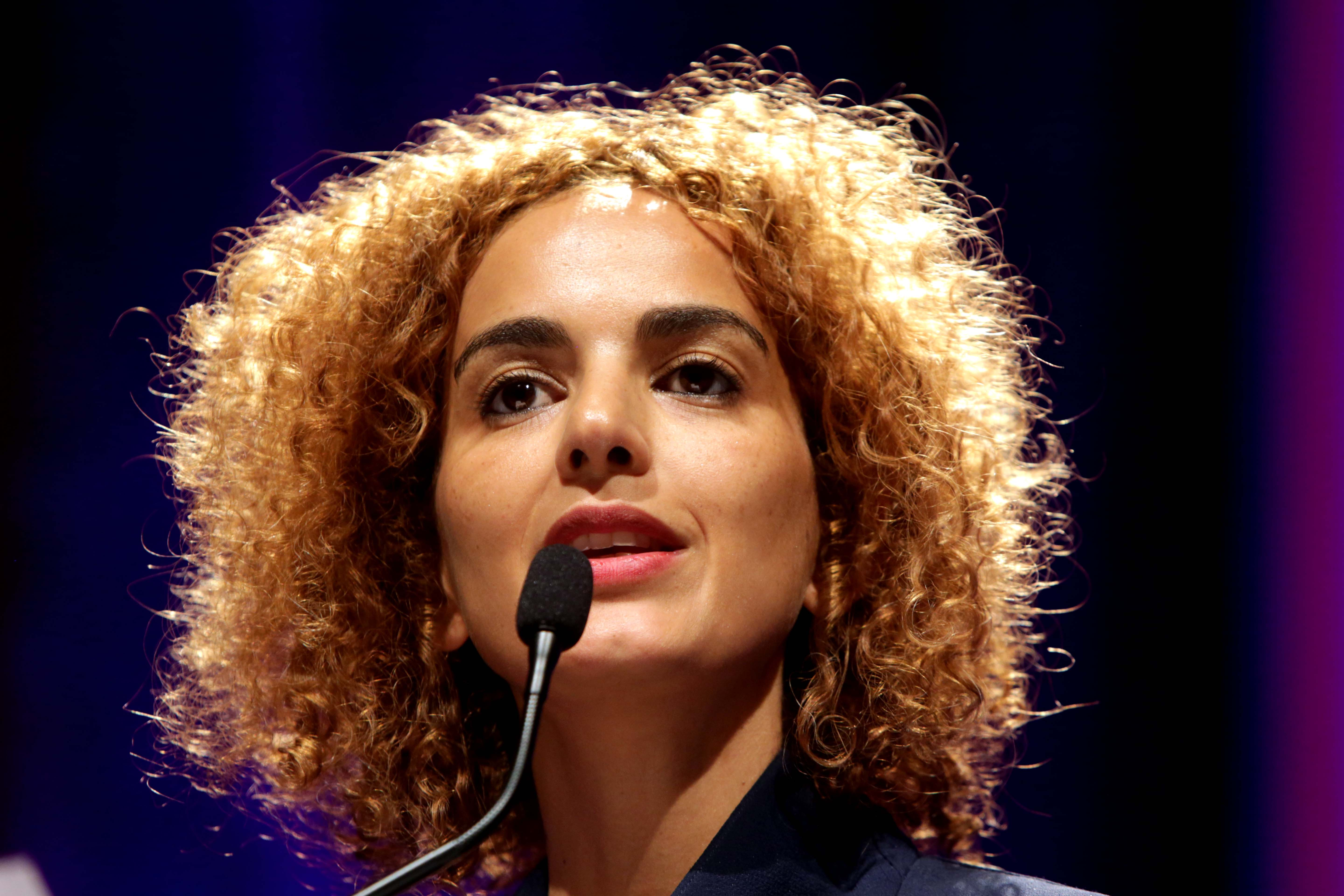 Convidada: Leïla Slimani, escritora franco-marroquina Data: 20 de junho de 2018 Local: Teatro Santander Crédito das imagens: Fronteiras do Pensamento / Greg Salibian